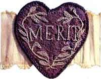 Badge of Military Merit - Badge du mérite Militaire (USA)